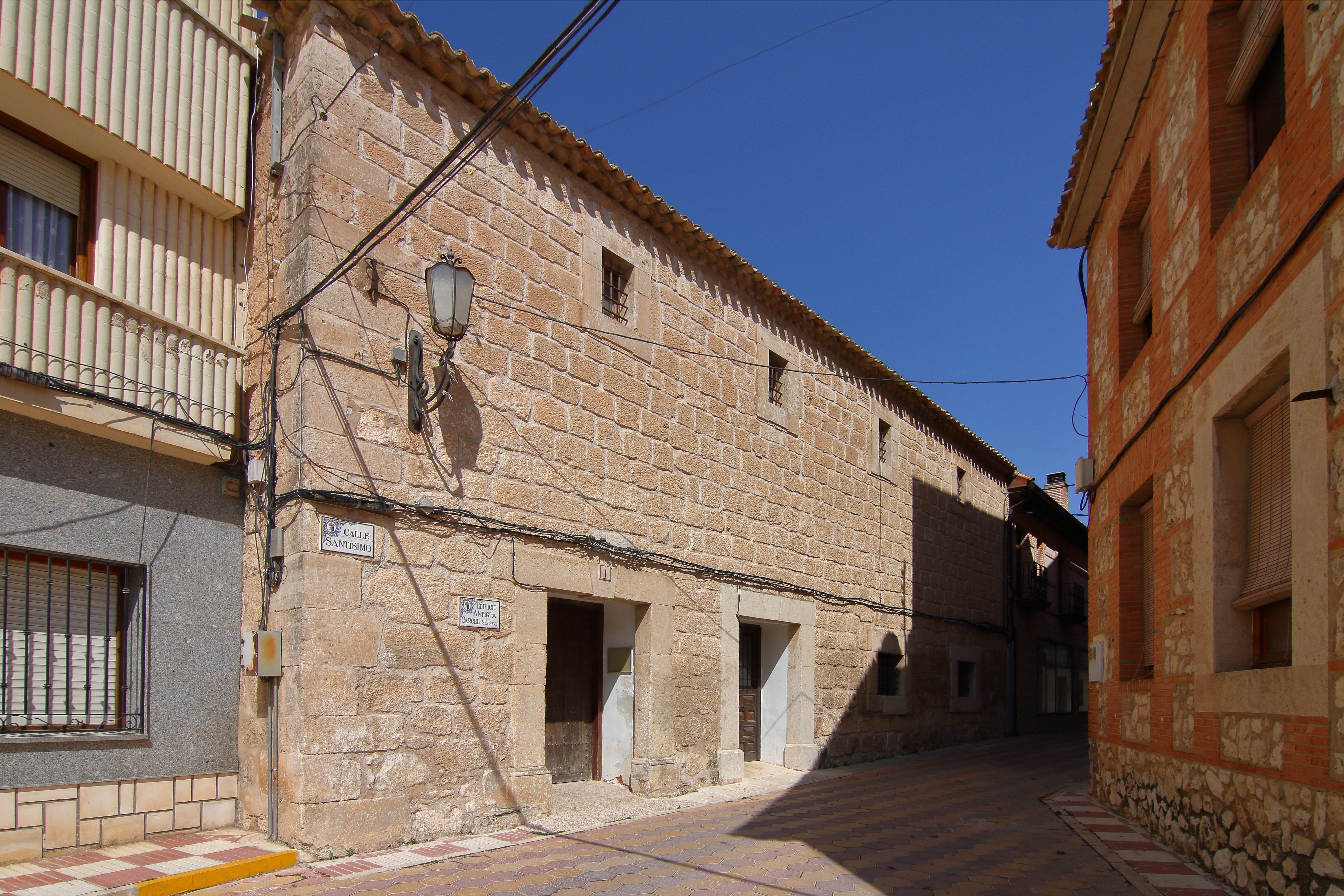 Horcajo de Santiago, antigua cárcel